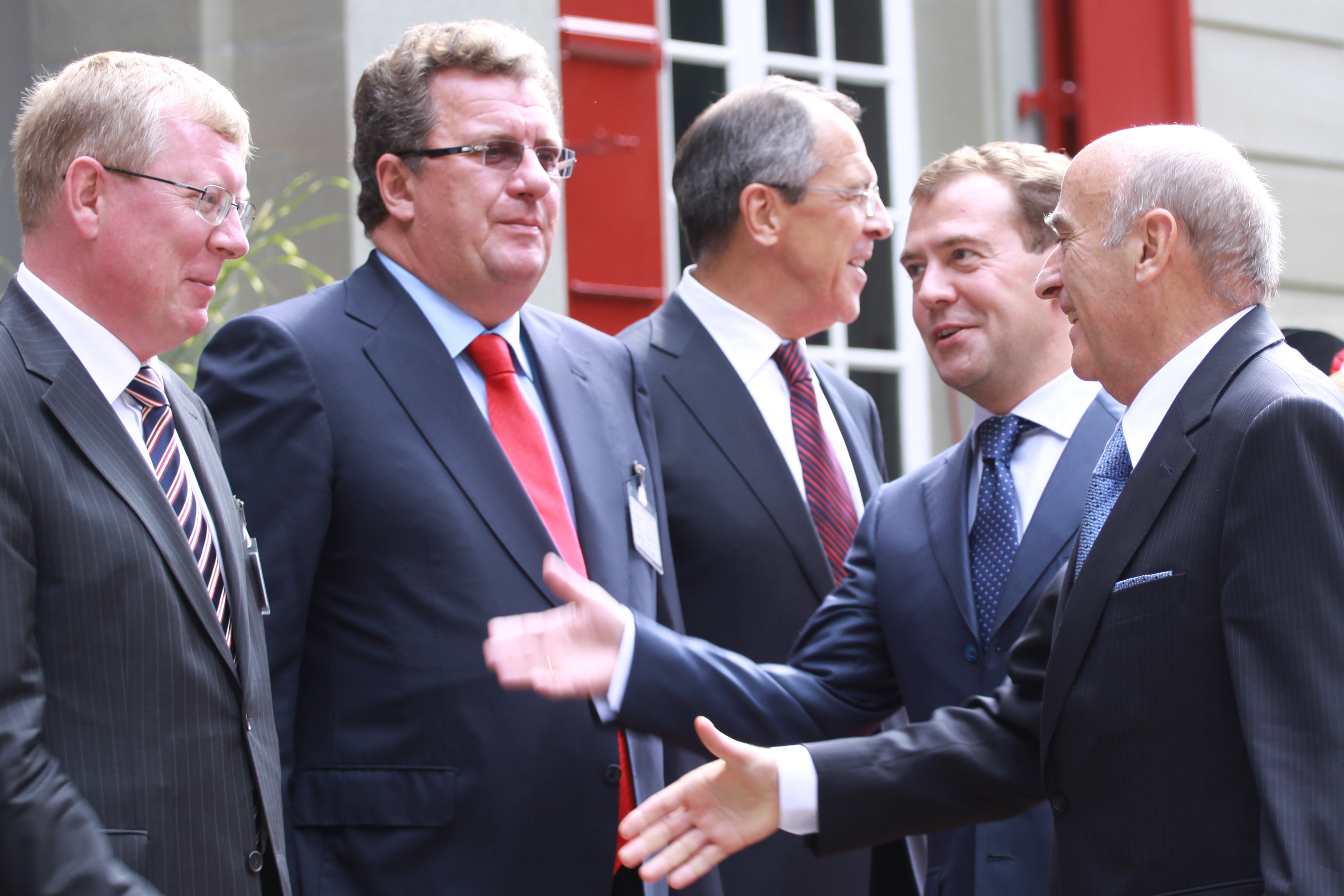 Zuerich, CHE, 21.09.2009: Praesident Dmitri Medwedew beim Staatsbesuch in der Schweiz Der russische Botschafter Igor Bratchikov, Praesident Dmitri Medwedew und der Schweizer Bundespraesident Hans-Rudolf Merz beim Staatsbesuch im Landgut Lohn in Bern (v.l.n.r). [ (c) Juerg Vollmer / maiak - The Newsroom, Postfach 5093, 8045 Zuerich, fon: +41 44 586 11 43, ; You are free to copy, distribute and transmit the foto free of charge with attribute by the author and . ; ArchivNr.: Staatsbesuch Dmitri Medwedew - 14 ; ]